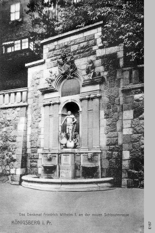 Friederich Wilhelm I Denkmal bei den Schlossterrassen